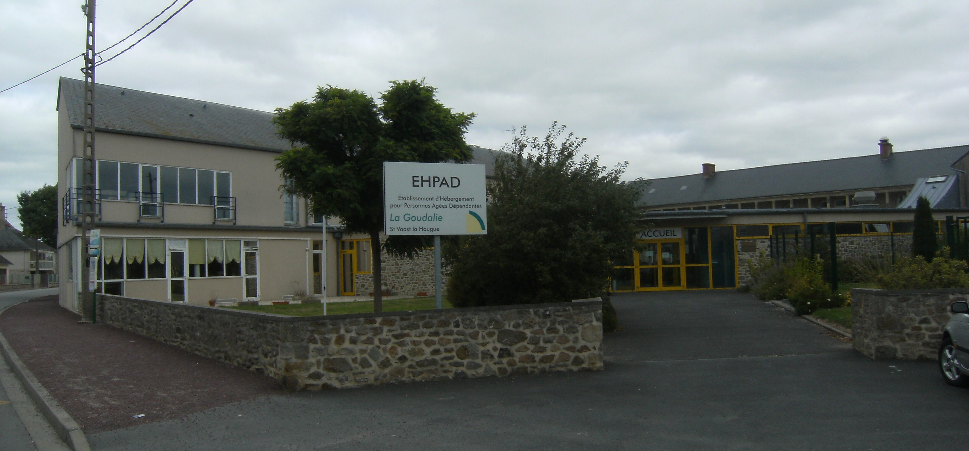 EHPAD de Saint-Vaast-la-Hougue (Manche, France). Maison de personnes âgées.